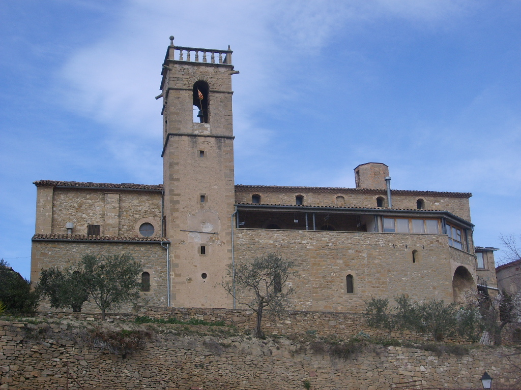 Castellgalí (Bages) Església de Sant Miquel